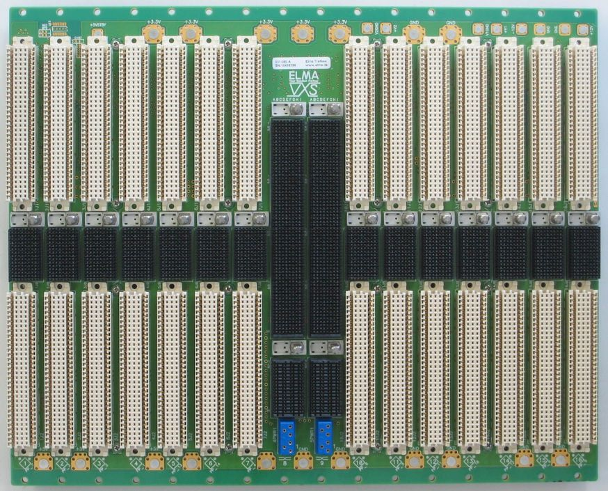 Das Bild zeigt eine 16-Slot VXS Backplane mit 14 Node-Slots und 2 Switch Slots